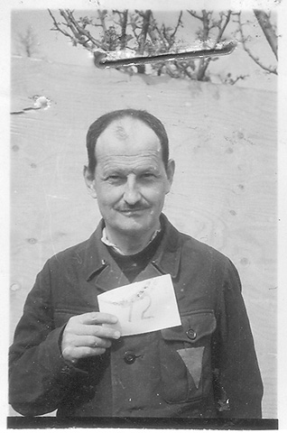 Benedikt Kautsky, ehemaliger österreichischer Häftling (Haft-Nr. 121415), mit der Nummer 42 nach seiner Befreiung im KZ Buchenwald.